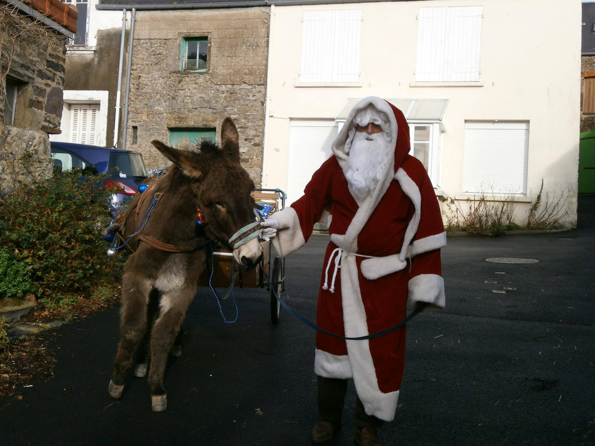 Ane normand